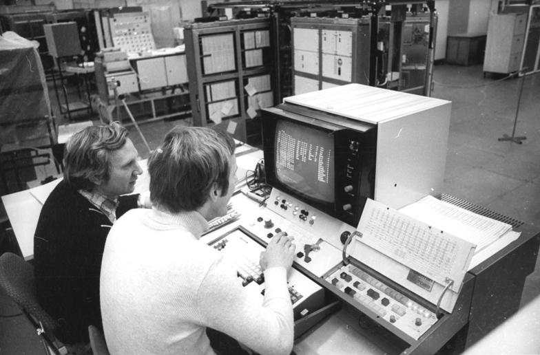 VEB Robotron Elektronik Dresden, Computer EC 1055 ADN-ZB Häßler 4.1.80 Dresden: Integration- 480.000 Operationen pro Sekunde sichert das neue elektronische Datenverarbeitungssystem "EC 1055" aus dem VEB Robotron-Elektronik Dresden. Die erste Anlage aus der Eser-Familie - der einheitlichen elektronischen Rechentechnik der sozialistischen Länder - wurde an die UdSSR geliefert. - Die Prüffeld-Ingenieure Reinhard Stellfeld (r.) und Eberhard Birkner (l.) testen eine neue Anlage.